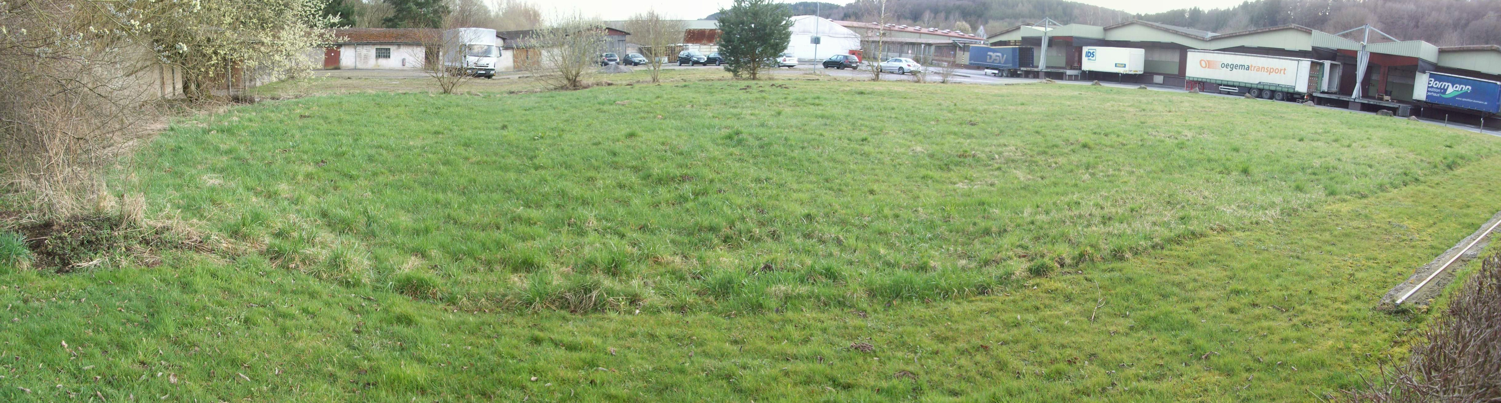 (Schlechtes zusammengestztes Panorama) Gelände des Burgstalls Waldau in Grasellenbach OT Wahlen. Am unterschiedlichen Grasbewuchs ist der Verlauf eines Burggrabens andeutungsweise noch zu erkennen.